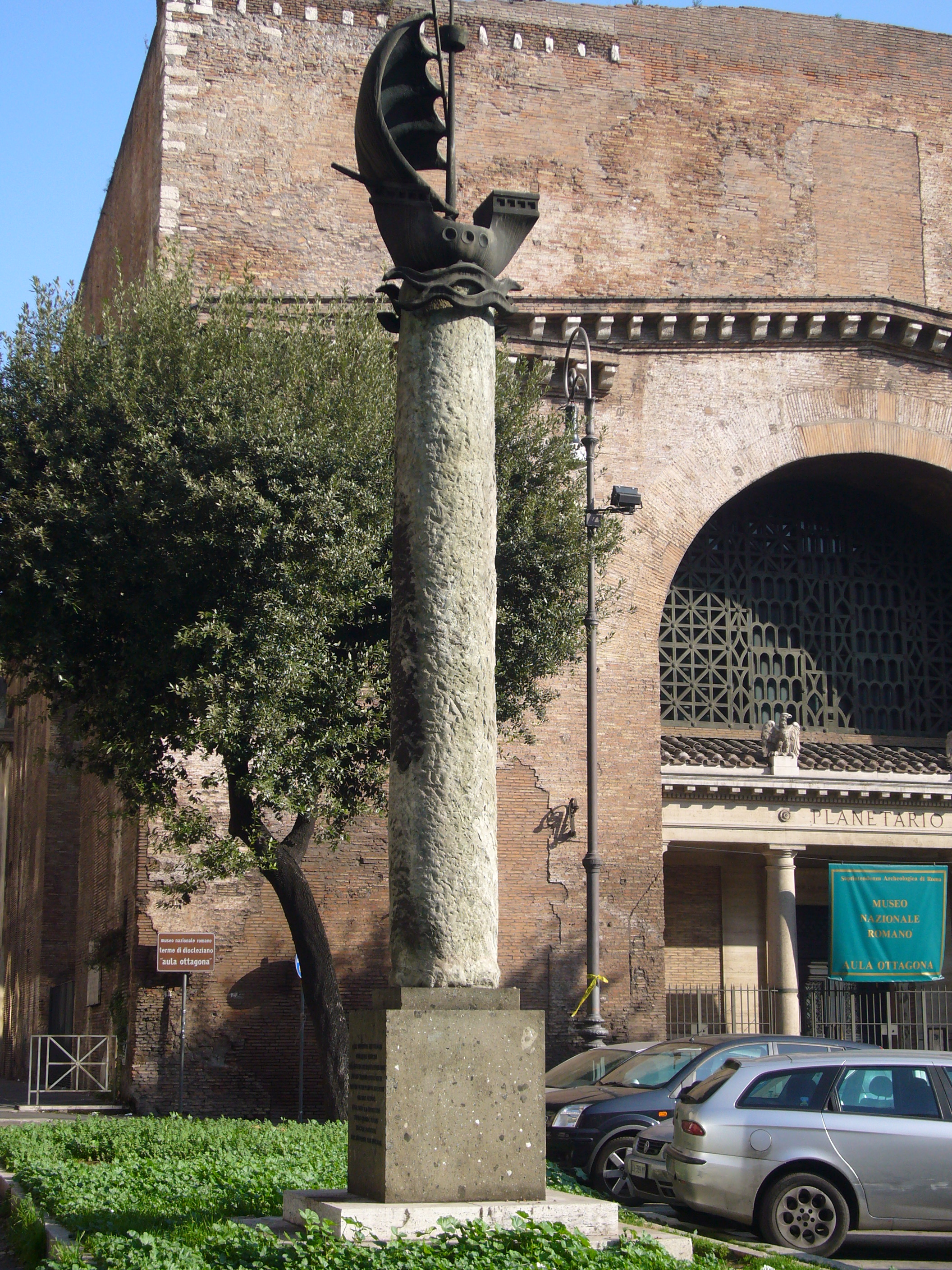 Roma, Terme di Diocleziano: colonna dedicata a Parigi (Lutetia Parisiorum) di fronte al Planetario (Aula ottagona), raffigura Scilicet la nave presente sullo stemma di Parigi. Posta in situ nel 1956 a celebrare il gemellaggio Roma-Parigi